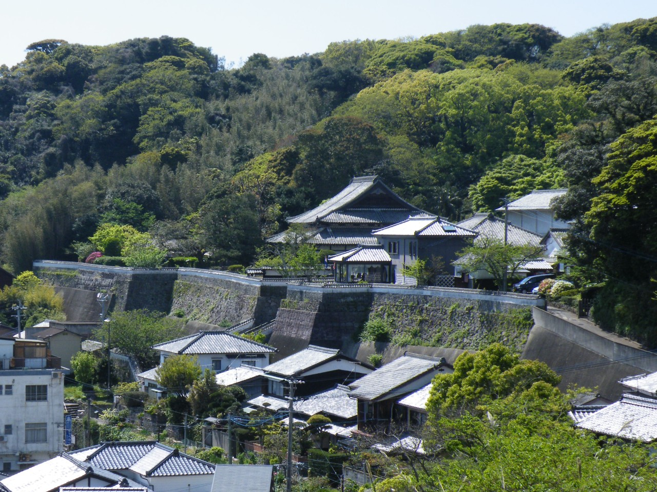 松浦史料博物館遠望（崎方公園下から）